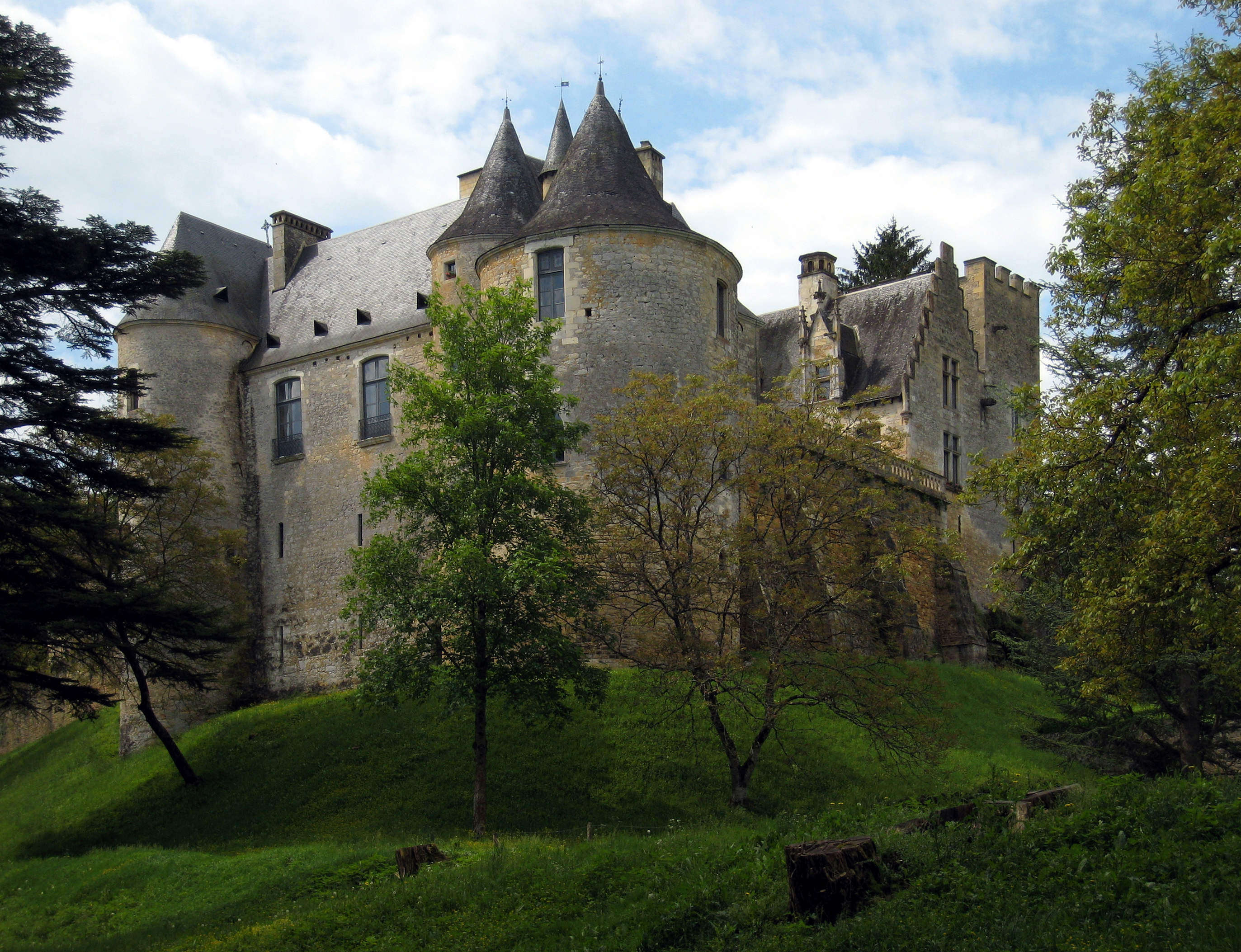 Château de Fayrac at the river Dordogne near the village of Castelnaud-la-Chapelle, Département Dordogne/France.